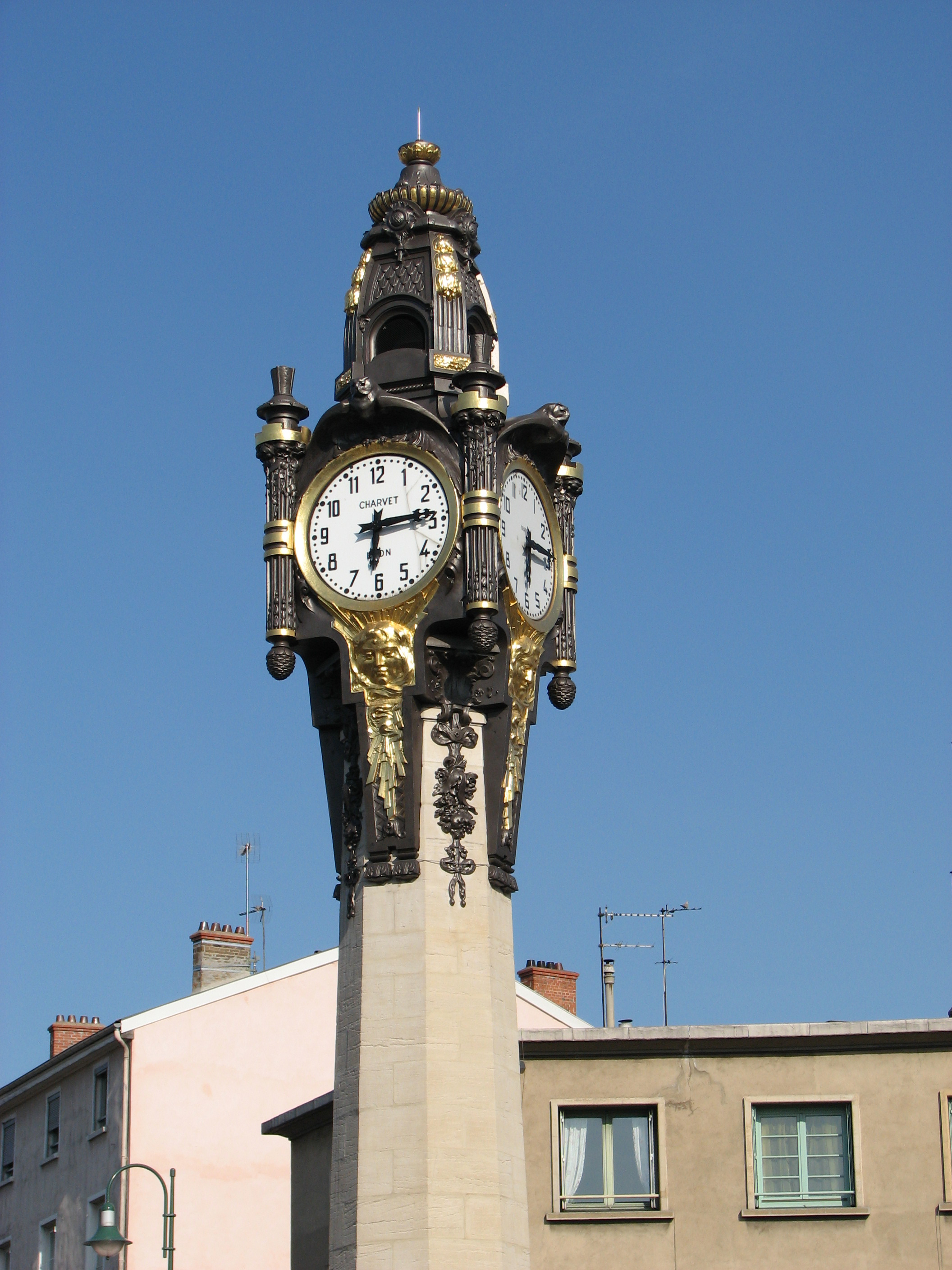 Horloge de Tassin-la-Demi-Lune